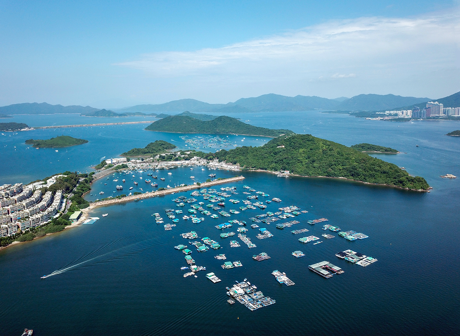 Sam Mun Tsai & Yim Tin Tsai